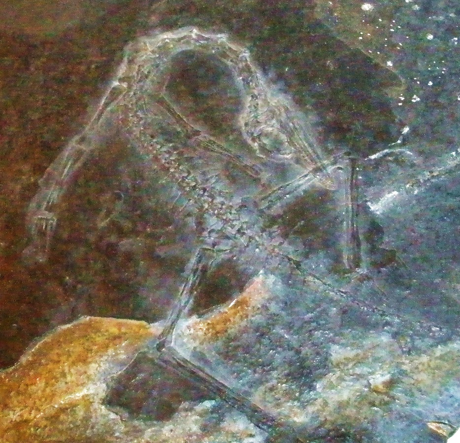 Fossil of Macrocnemus, an extinct reptile. - Took the photo at Museo dei Fossili di Besano